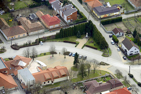 Újhartyán Fő tér légi fotó